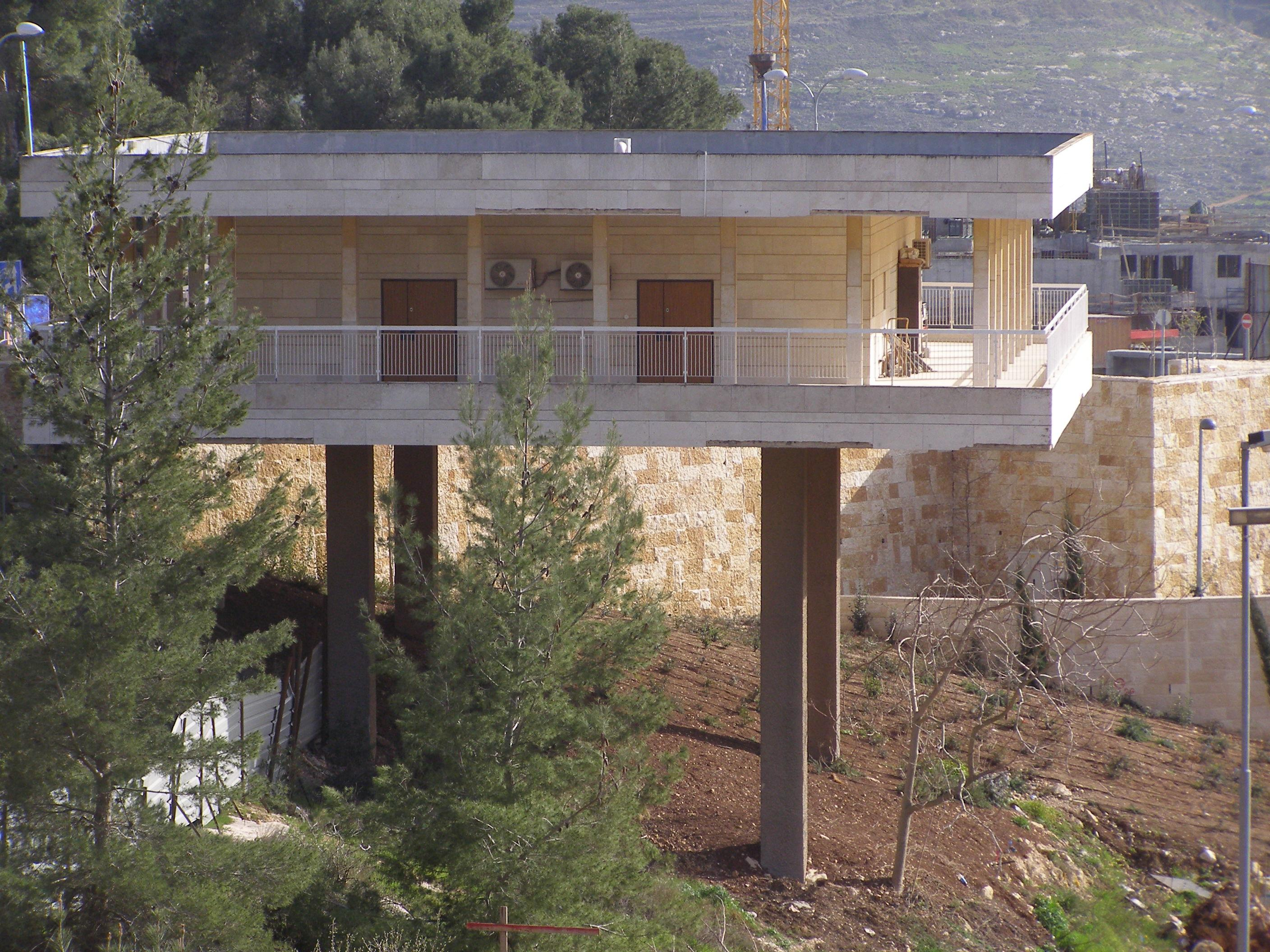 בית הנס קרוך בית מלון ארץ הצבי רישיון נוצר על ידי משתמש:Ranbar